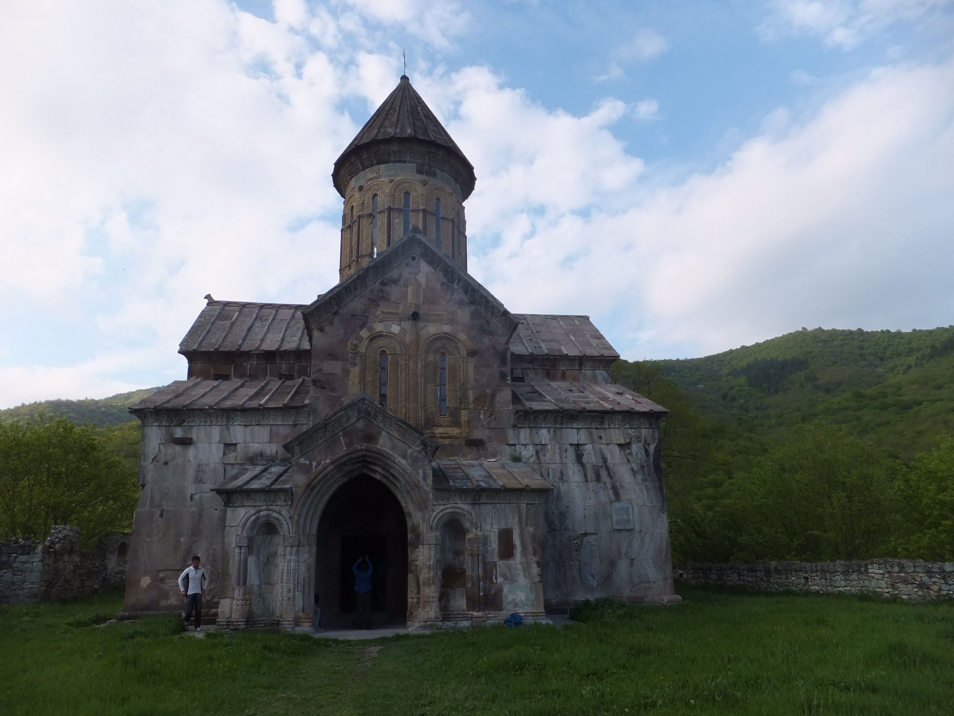 ფიტარეთის მონასტერი→ტაძარი გუმბათიანი, სამრეკლო, გალავანი და სხვა ნაგებობანი